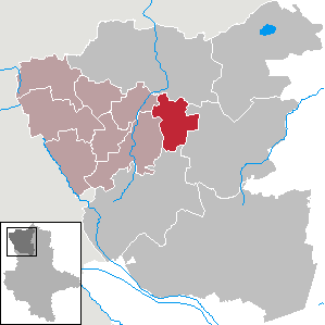 Apenburg-Winterfeld im Altmarkkreis Salzwedel